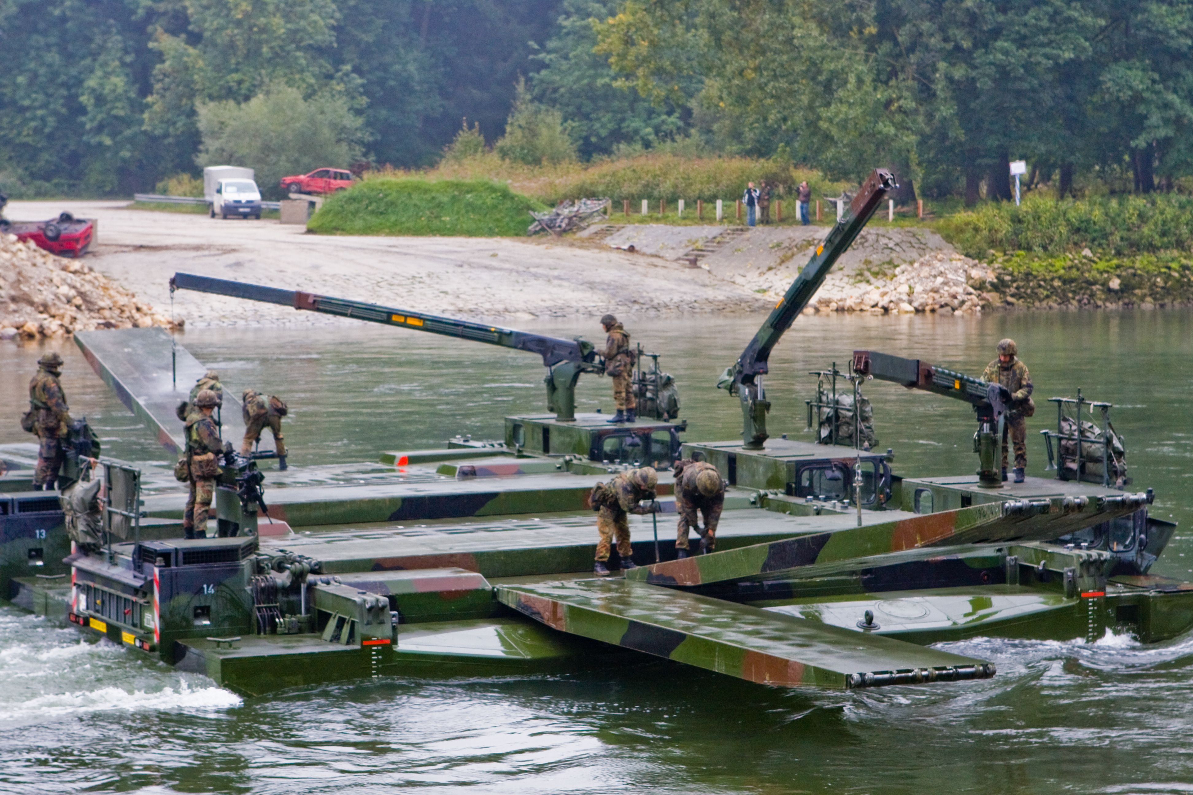 M3G mobile ferry